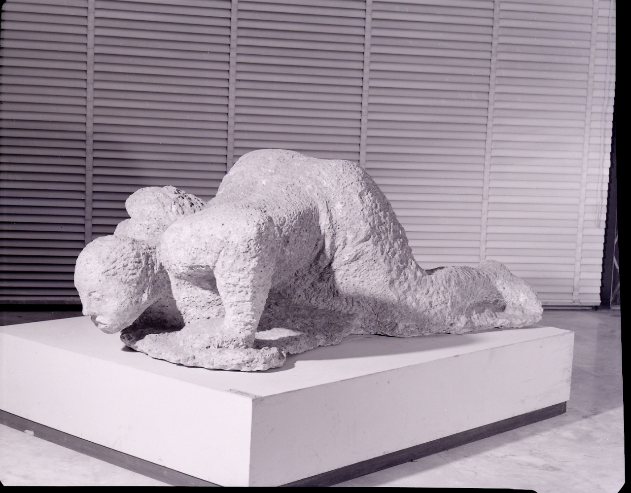 Servizio fotografico : Italia, 1966 / Paolo Monti. - Buste: 24, Fototipi: 25 : Negativo b/n, gelatina bromuro d'argento/ pellicola ; 10x12. - ((Serie costituita da 24 buste sciolte di negativi identificati con i nn.: 12255, 12256, 12257, 12258, 12259, 12260, 12260bis, 12261, 12262, 12263, 12264, 12265, 12266, 12267, 12667bis, 12268, 12268bis, 12269, 12269bis, 12270, 12270bis, 12271, 12272, 12272bis. - Occasione: Documentazione per una pubblicazione edita dalla casa editrice Electa per un concorso di scultura ("Scultura italiana", Milano, Electa, 1966-1968). - Fonte: Monografia di Cecchi Emilio, Sapegno Natalino (a cura di): Storia della Letteratura Italiana, 9 voll., Milano, Garzanti (1966 e segg.). - Fonte: Agenda di Paolo Monti: Monti/ 2/ 6 giugno 1964 - 31 marzo 1966/ 8194-12420 (1964-1966), presso Archivio Paolo Monti